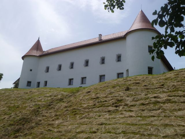 Schloss_Teichstätt_-_Heute